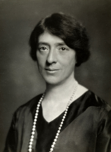 portrett, kvinne, skuespillerinne, brystbilde.